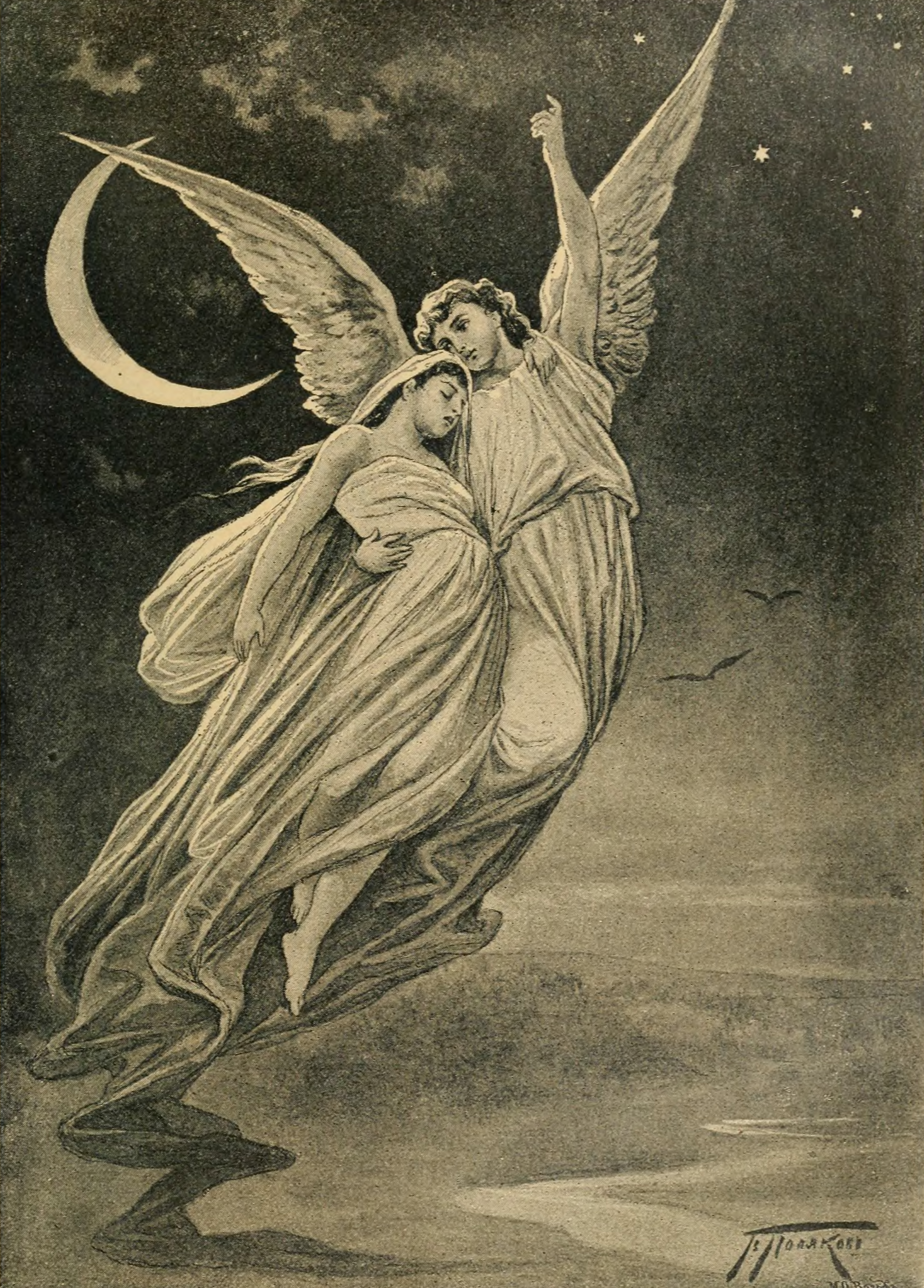 Иллюстрация В. А. Полякова к стихотворению М. Ю. Лермонтова «Ангел»